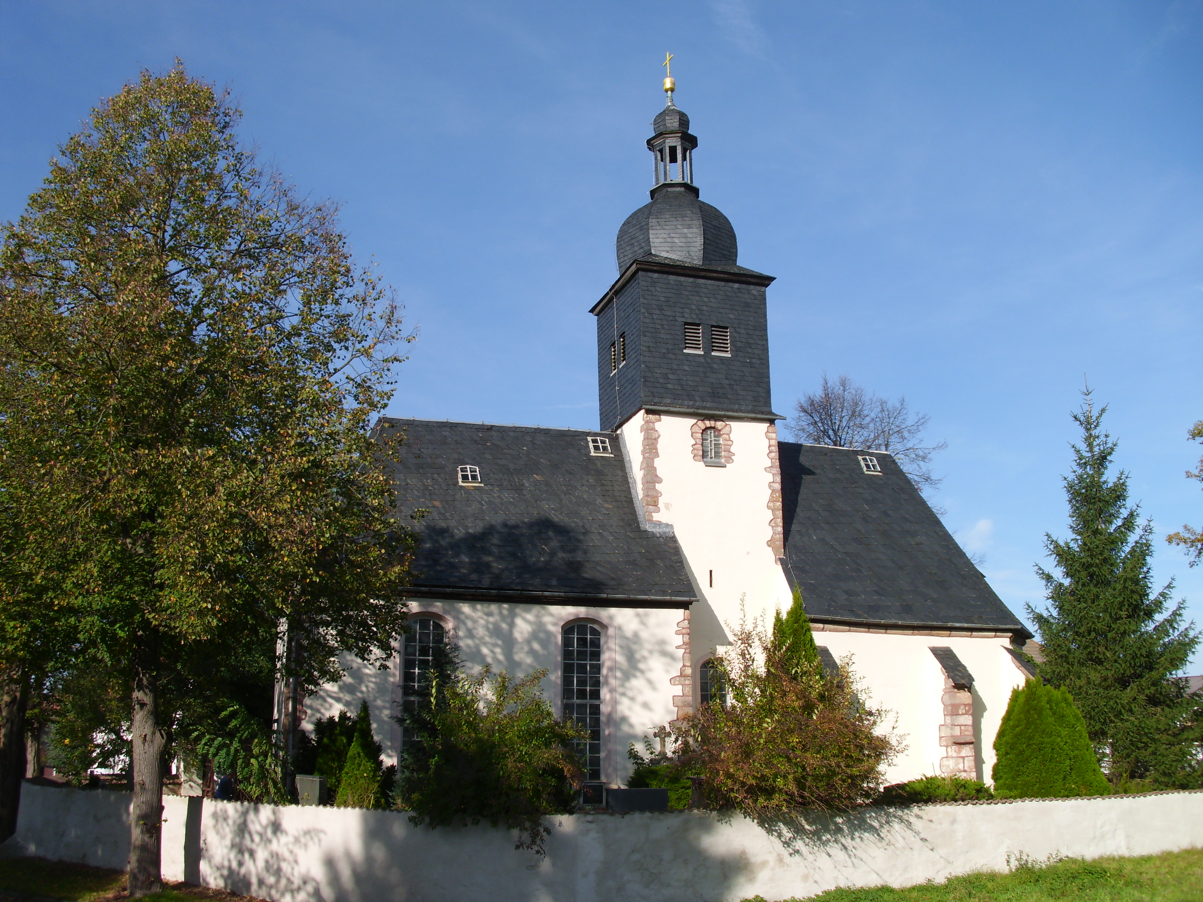 Church St. Marien in Wetzdorf